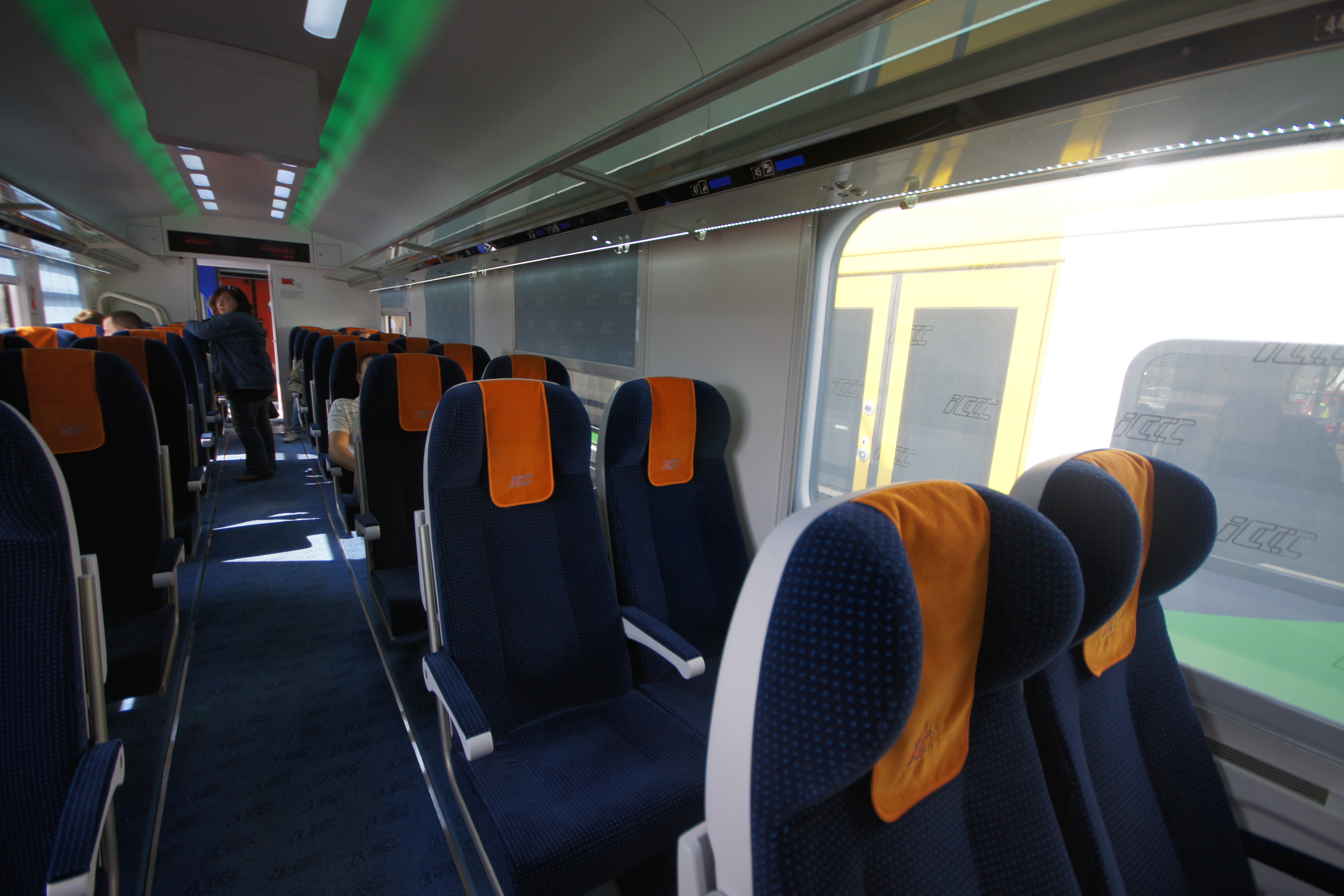 wnętrze wagonu bezprzedziałowego 2 klasy 159A w PKP Intercity